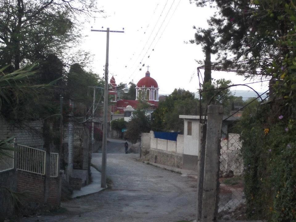 La capilla desde anca la nana